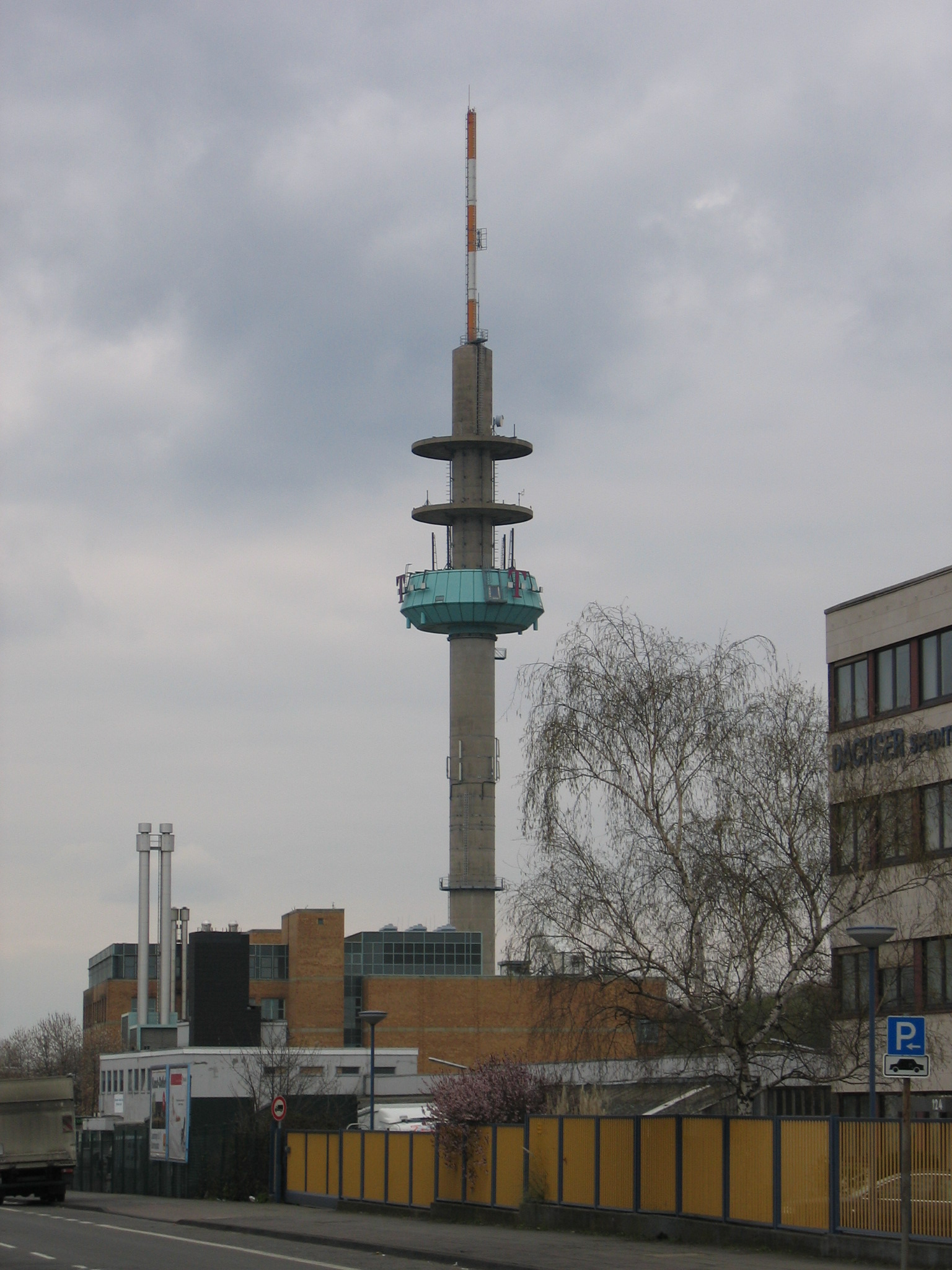 Pollonius, Köln